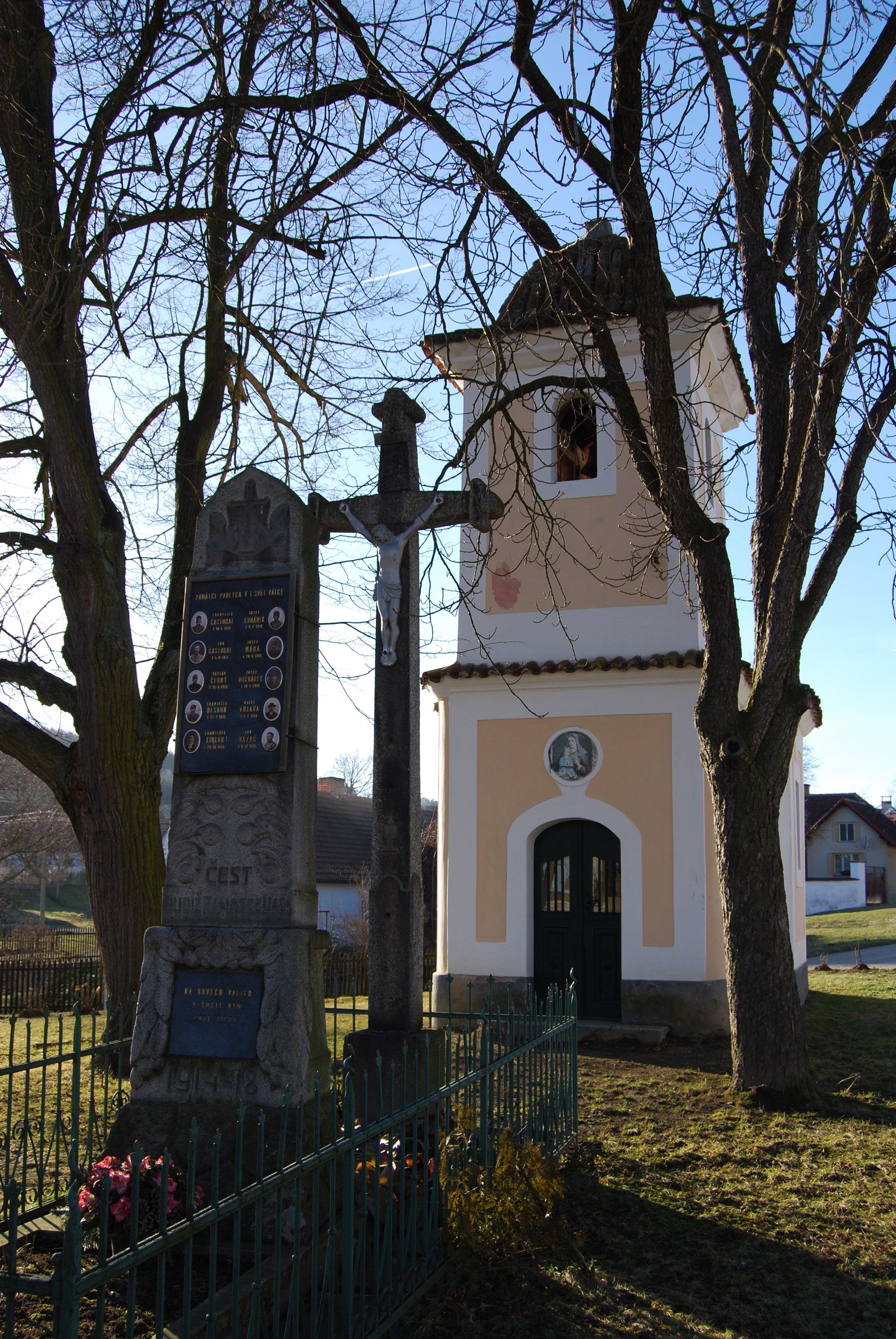 Kaple Zvěstování Panny Marie a kříž v obci. Velké Nepodřice je vesnice, část obce Dobev v okrese Písek. Česká republika.